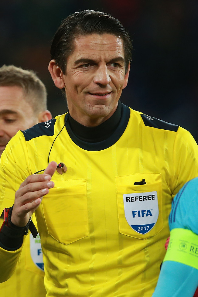 ЦСКА бьёт «Бенфику» в Москве